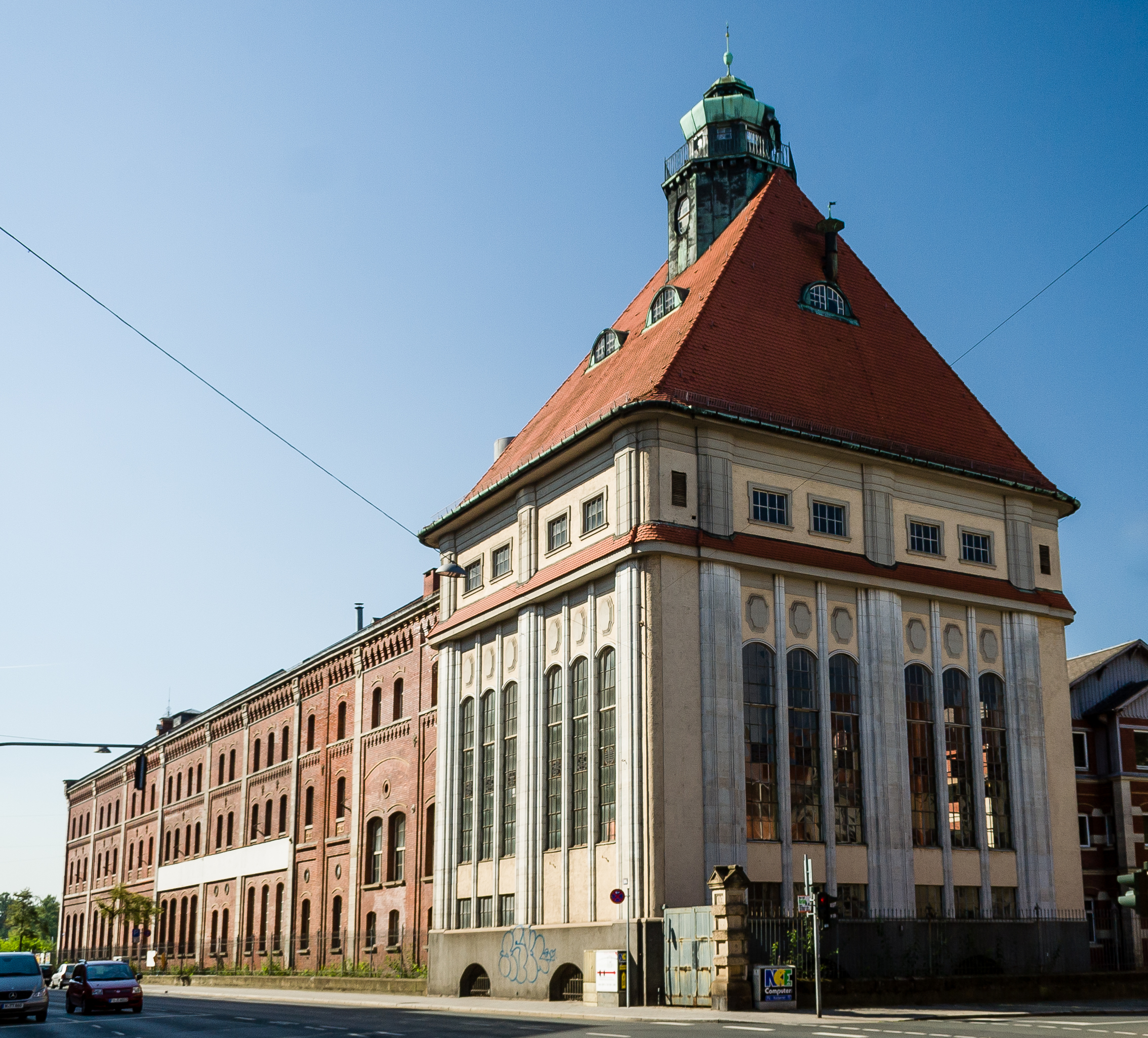 Ehem. Brauerei Johann Humbser, altes Sudhaus, Schwabacher Straße 106, Fürth